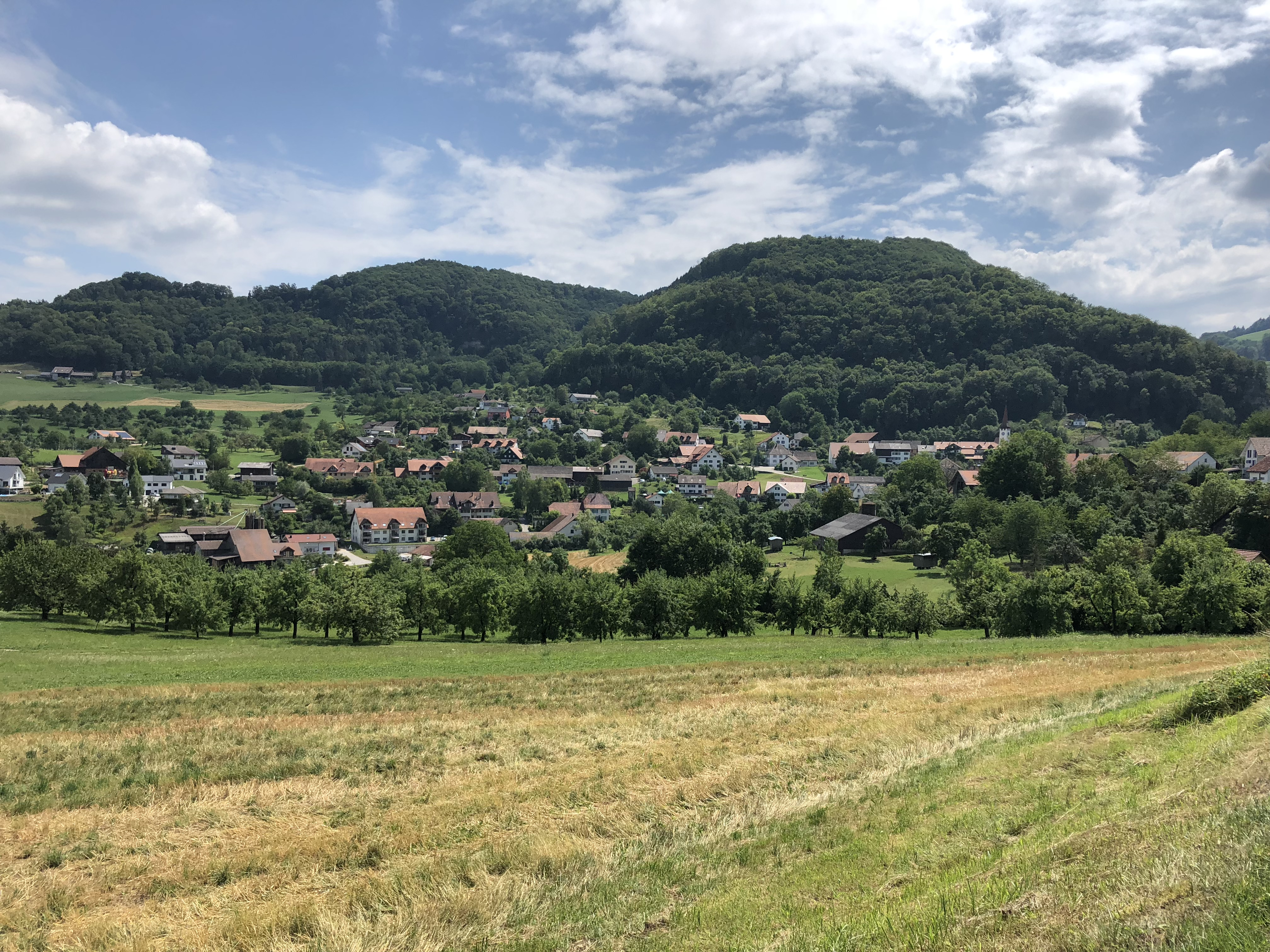 Kienberg SO